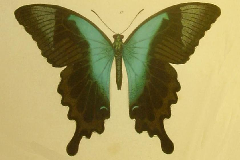 Papilio (Achillides) peranthus adamantius